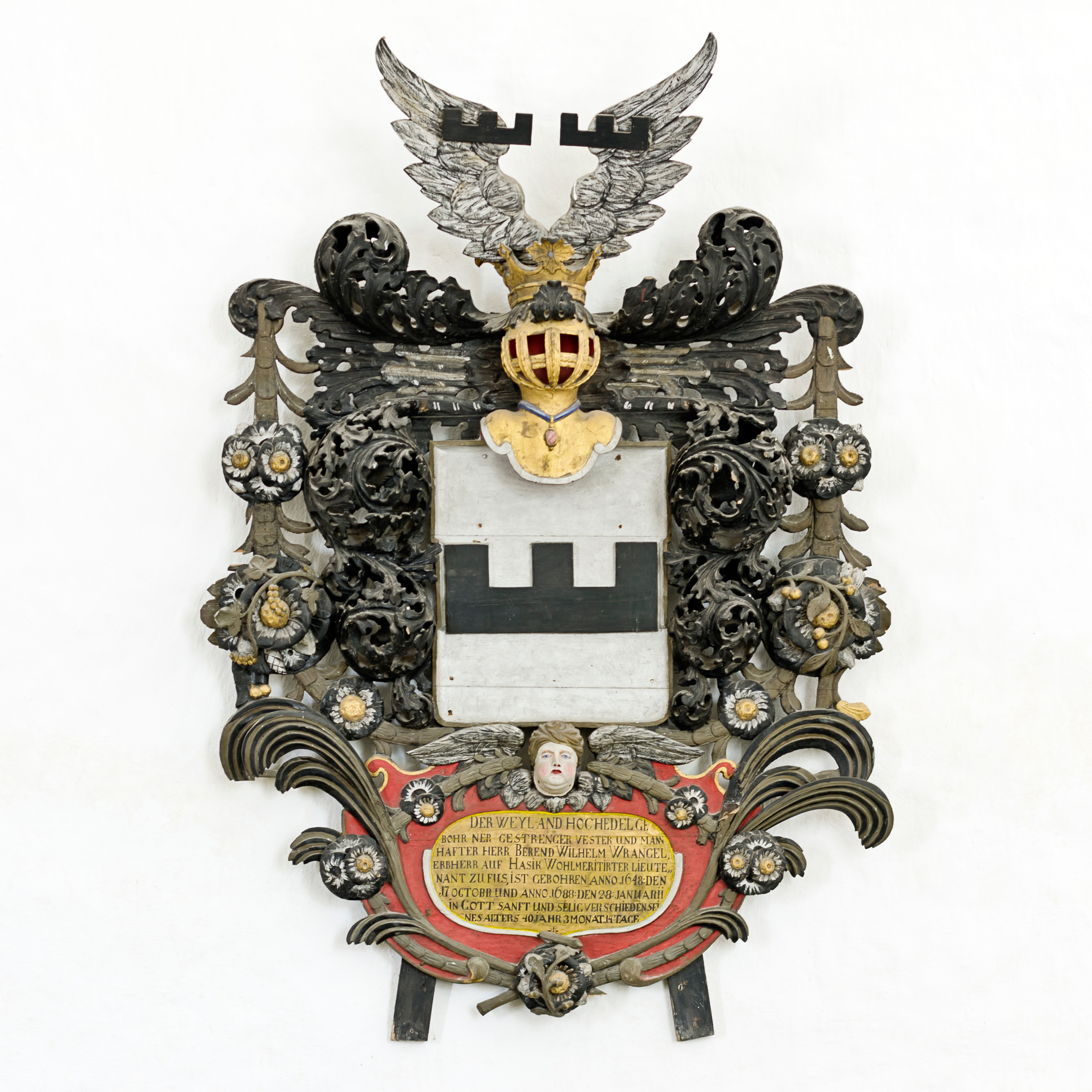 Wrangelli vapp-epitaaf Ridala kirikus, 17. saj